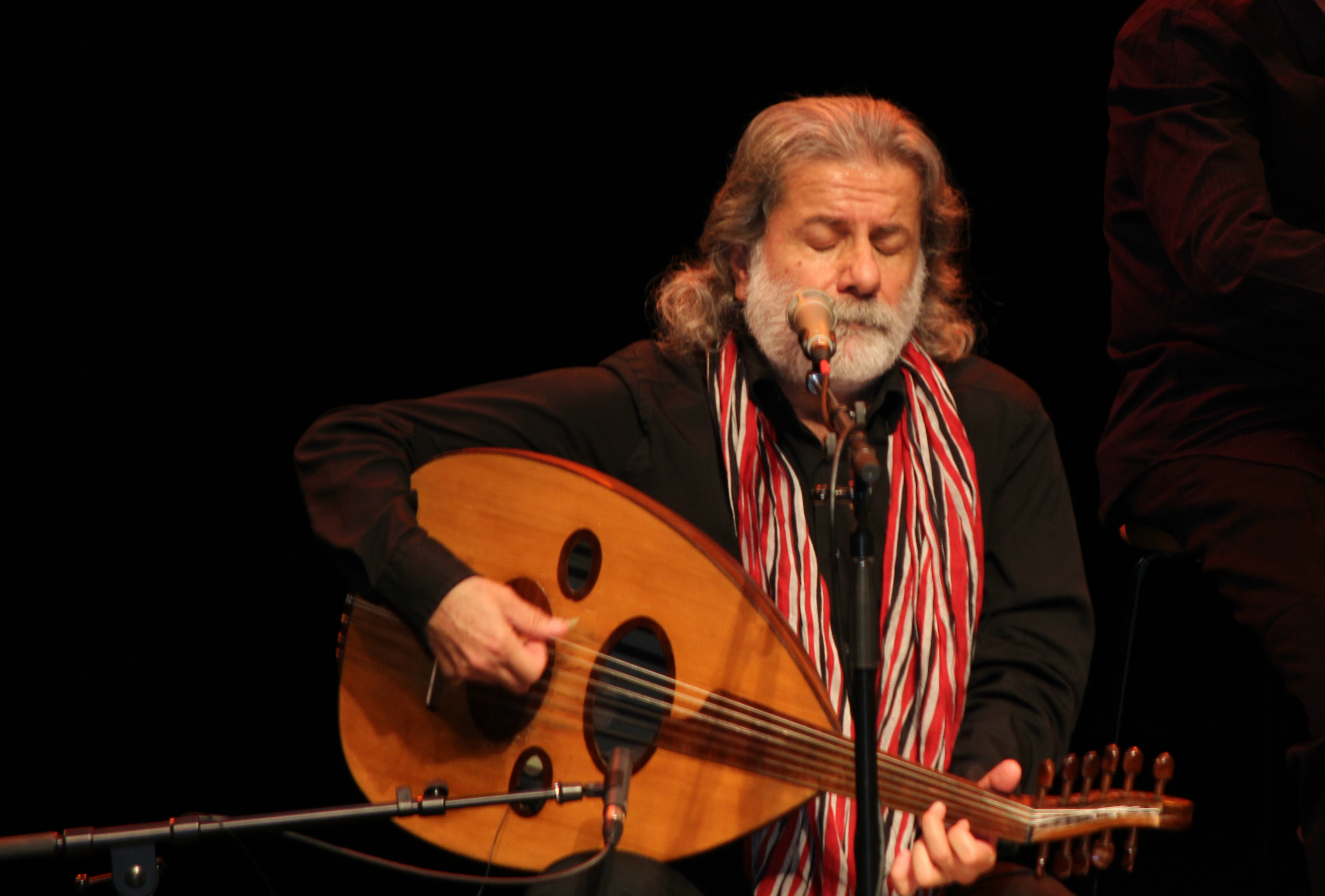 مارسيل خليفة عازفا على العود في حفلة أوتوا، في 10 أيار 2012